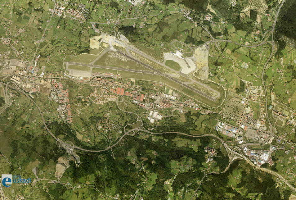 Bilboko aireportuaren ortoargazkia